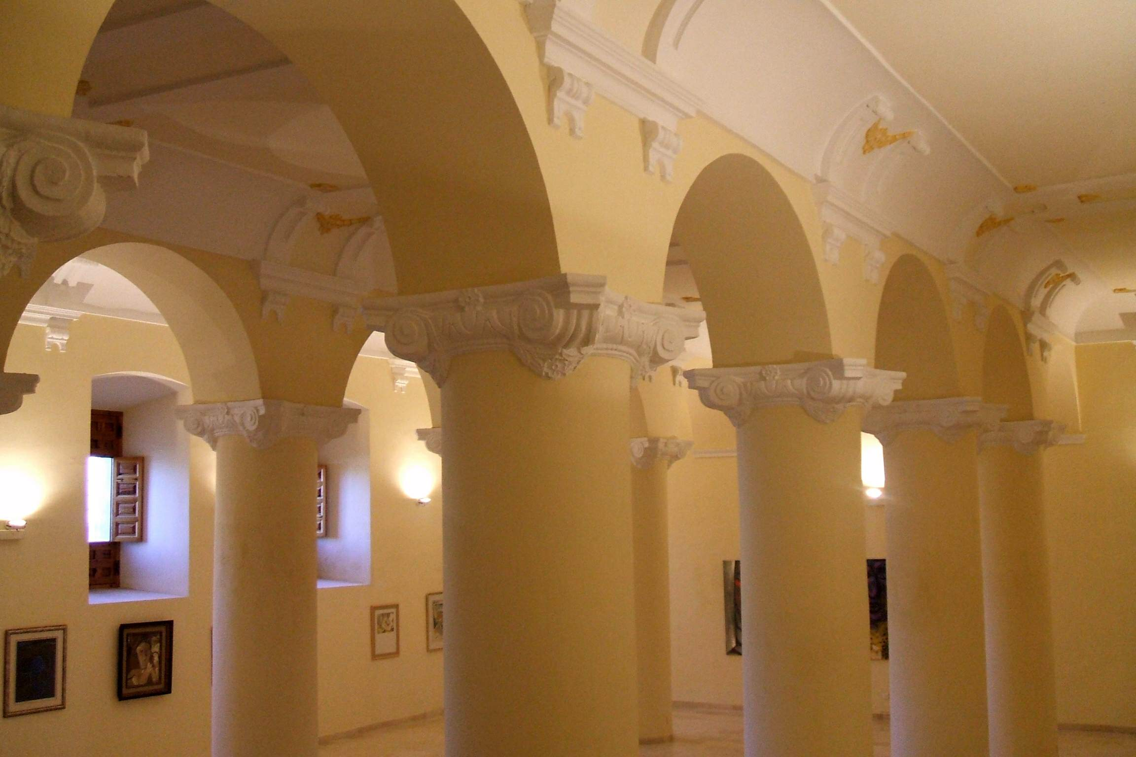 Monasterio de Santa Maria de la Merced y Museo de Arte Contemporaneo Florencio de la Fuente (Huete)